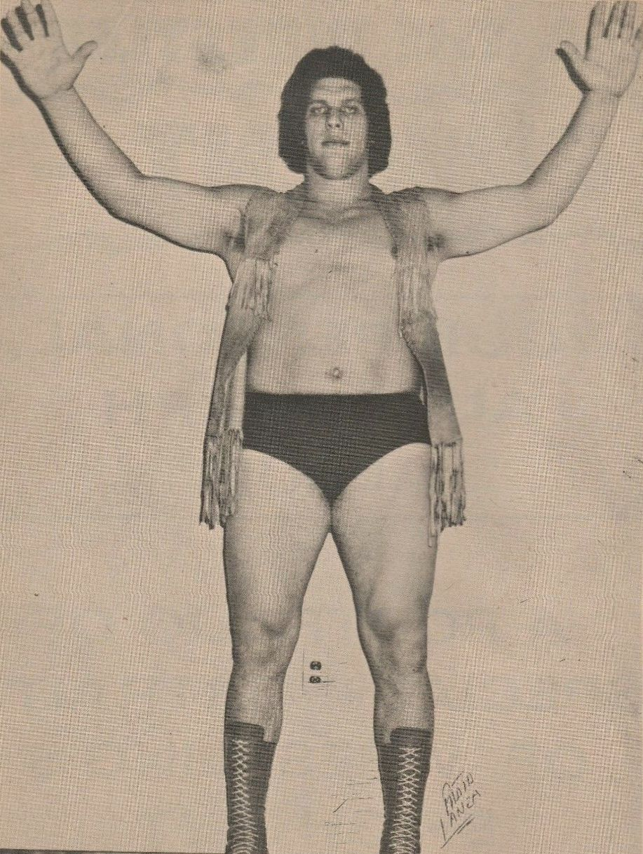 Jean Ferré sur une photo à dédicacer dans le magazine Wrestling Annual n.4 de 1973.